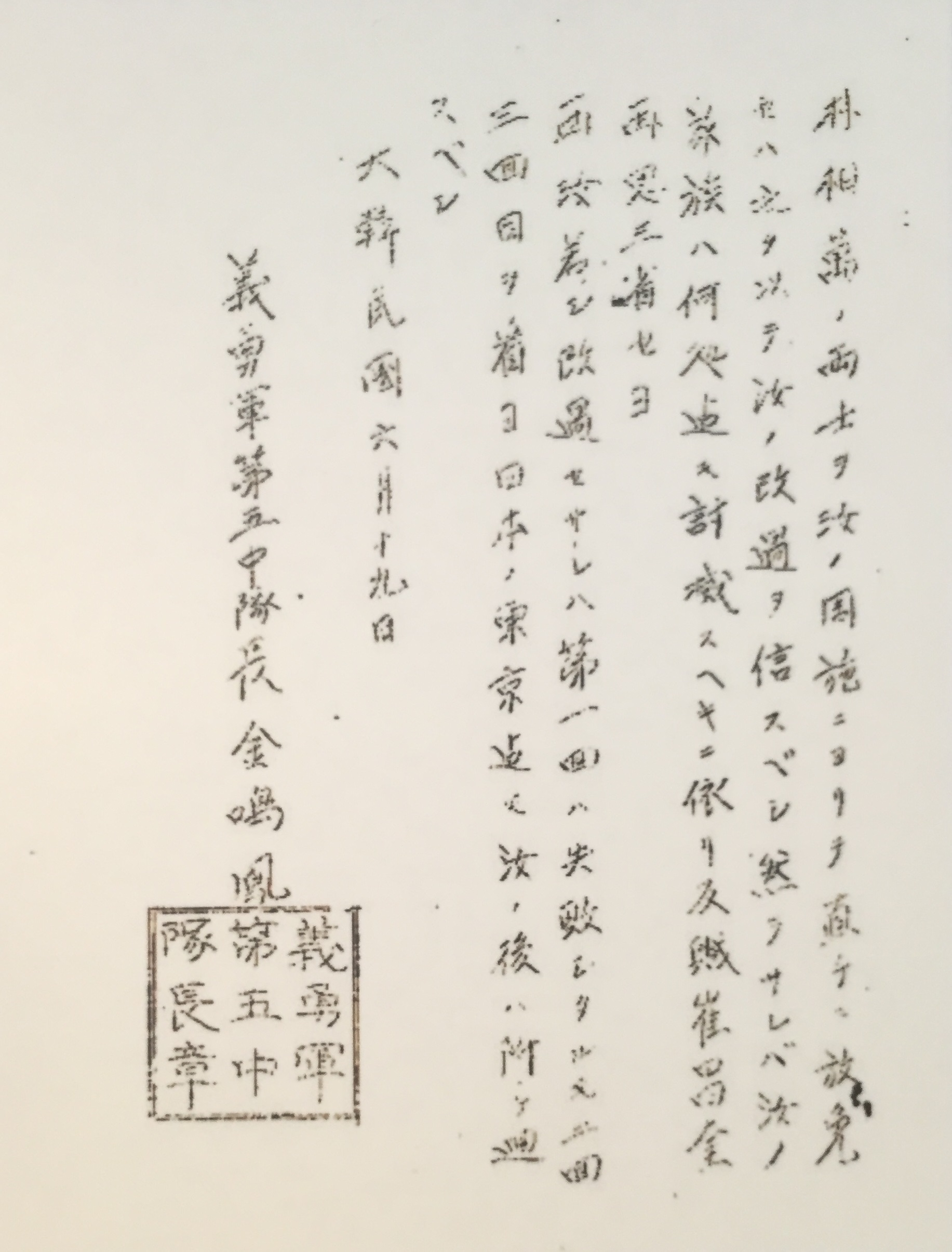 일본군이 파악한 박희광(박상만)의 인적사항